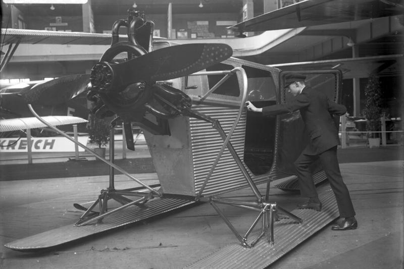 Russland stellt Propellerschlitten in den Passagier-Dienst! Unser Bild zeigt einen russischen Propeller-Schlitten welcher in den Passagierdienst derjenigen Gegenden Russlands gestellt wird, welche einer Beförderung mit der Eisenbahn im Winter unmöglich machen.